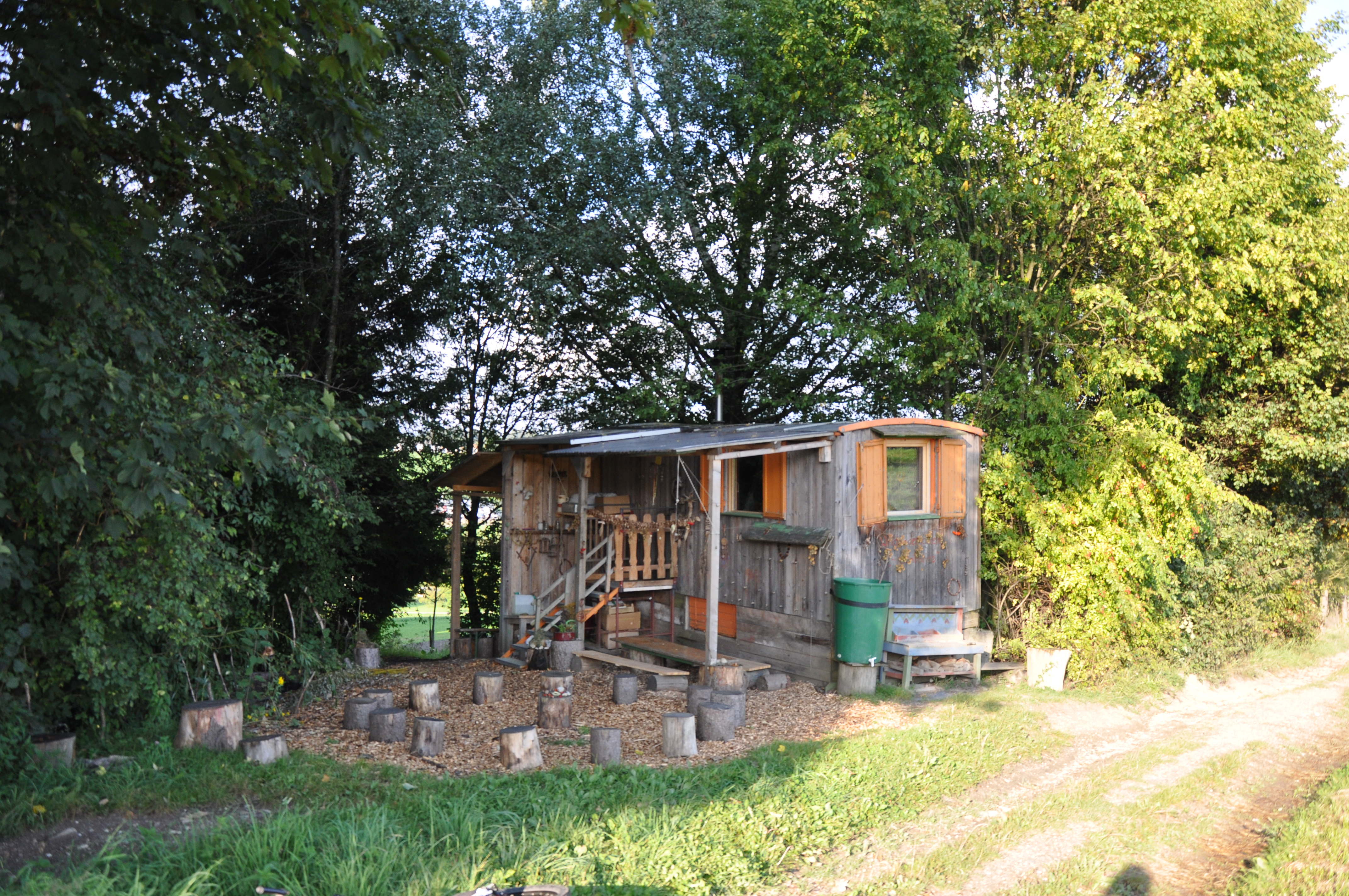 Der Waldkindergarten Lacken in Oberösterreich setzt auf Naturverbundenheit...